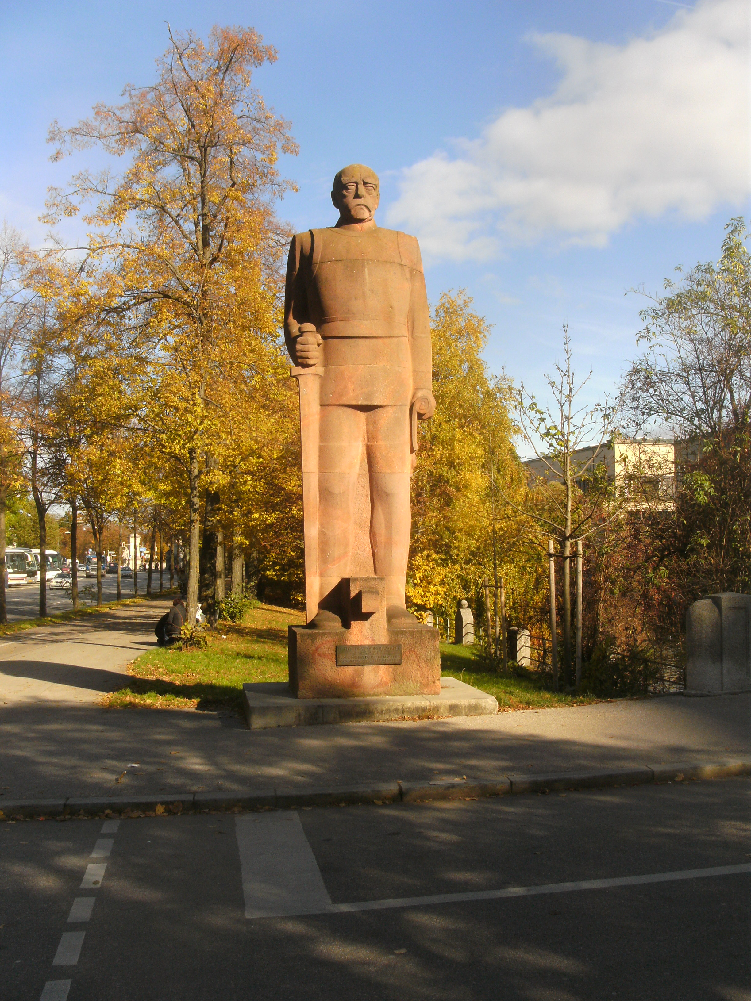 Bismarck-Denkmal in München an der Isarbrücke zur Museumsinsel (zwischen dem Deutschen Museum und dem Europäischen Patentamt)